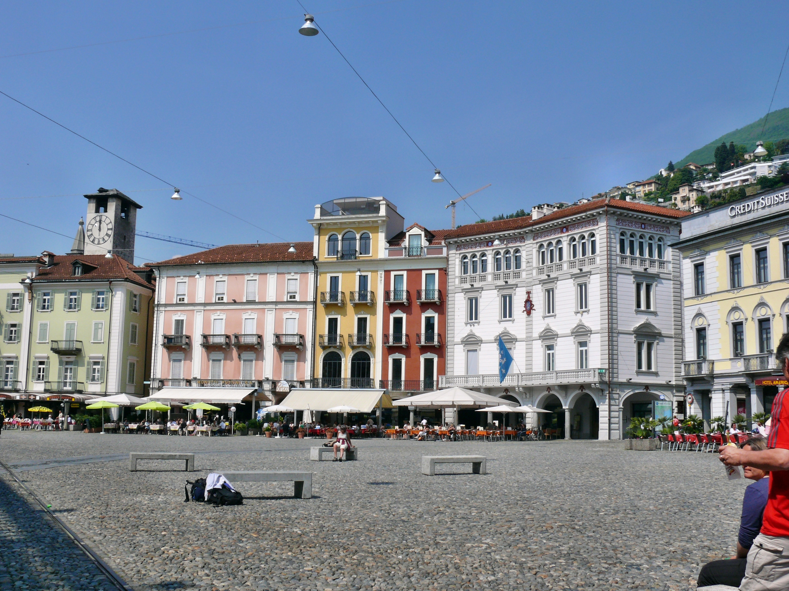 Piazza Grande in Locarno